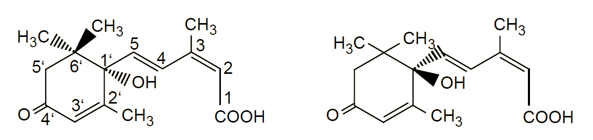 Se detalla la estructura química de los isómeros S o + y R o - de la molécula de ácido abscísico (ABA).